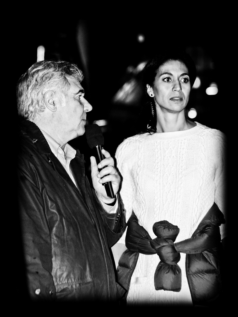 Sabine Quindou et Georges Pernoud pour Thalassa, sur France 3, le 11 novembre 2011 Canon EOS 500D ISO: 400 Exposition: 1/160 s Ouverture: 4.5 Longueur focale: 130mm (70-300) Avec flash: Oui 430EXII LIGHTROOM made MENARD photographie